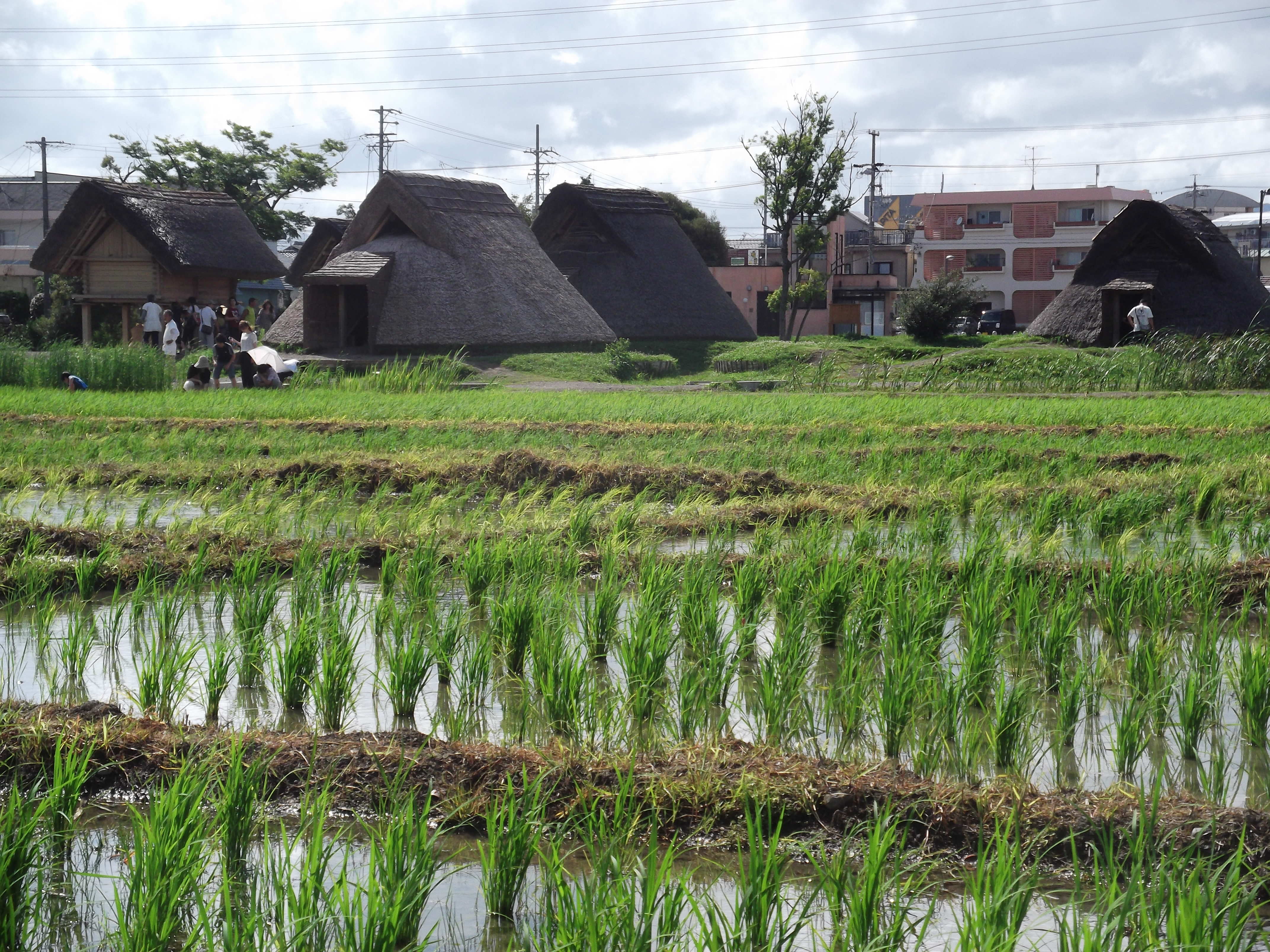 登呂遺跡の水田と竪穴式住居。2012年7月15日撮影。